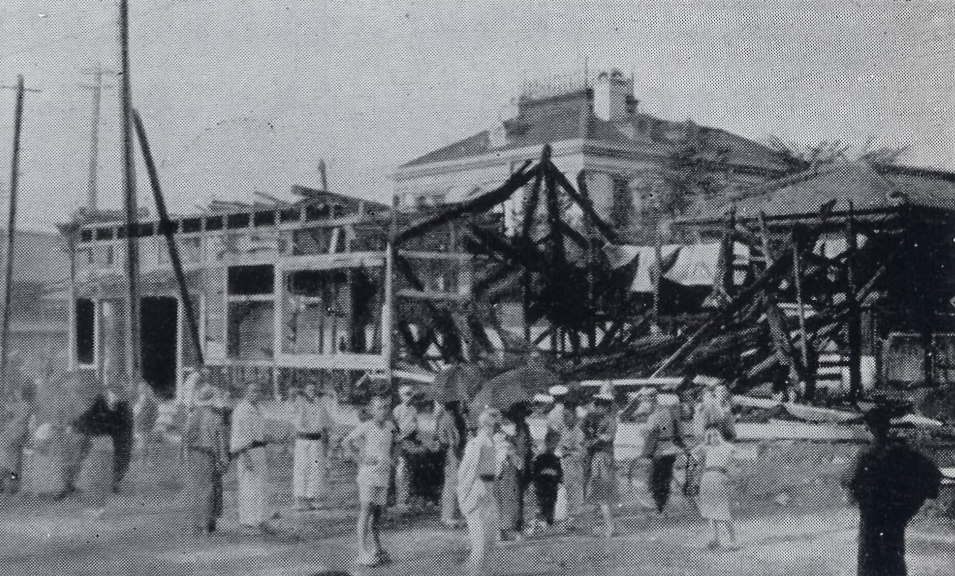 電車焼き討ち事件により焼失した柳橋駅舎